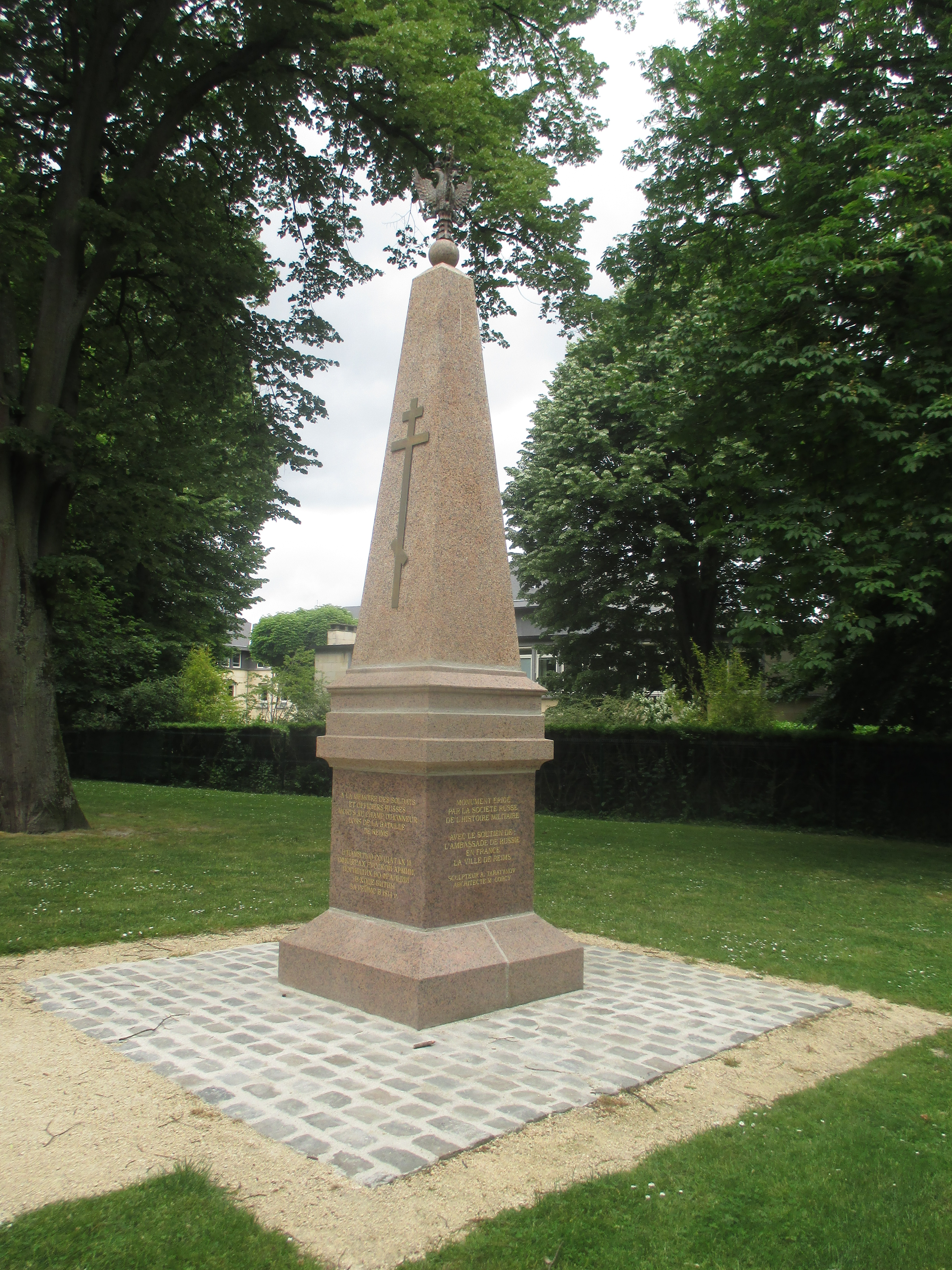 Obélisque en hommage aux soldats russes morts pendant la bataille de Reims en 1814.